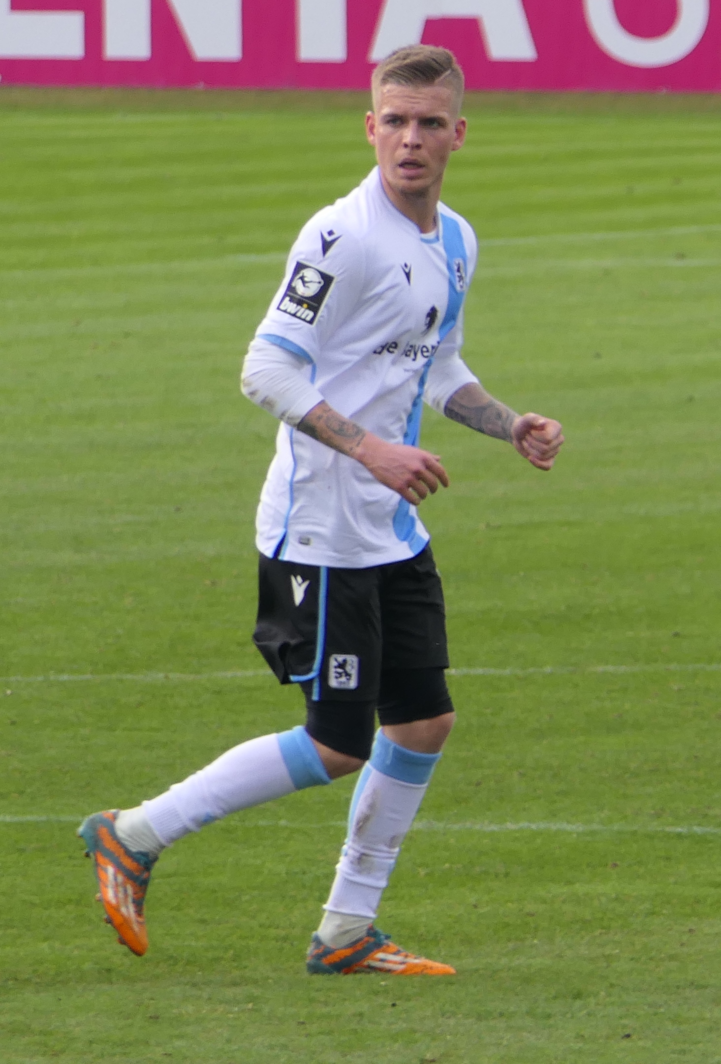 Der Fussballprofi Daniel Wein im Trikot vom TSV 1860 München beim Heimspiel gegen Eintracht Braunschweig am 26.01.2020.